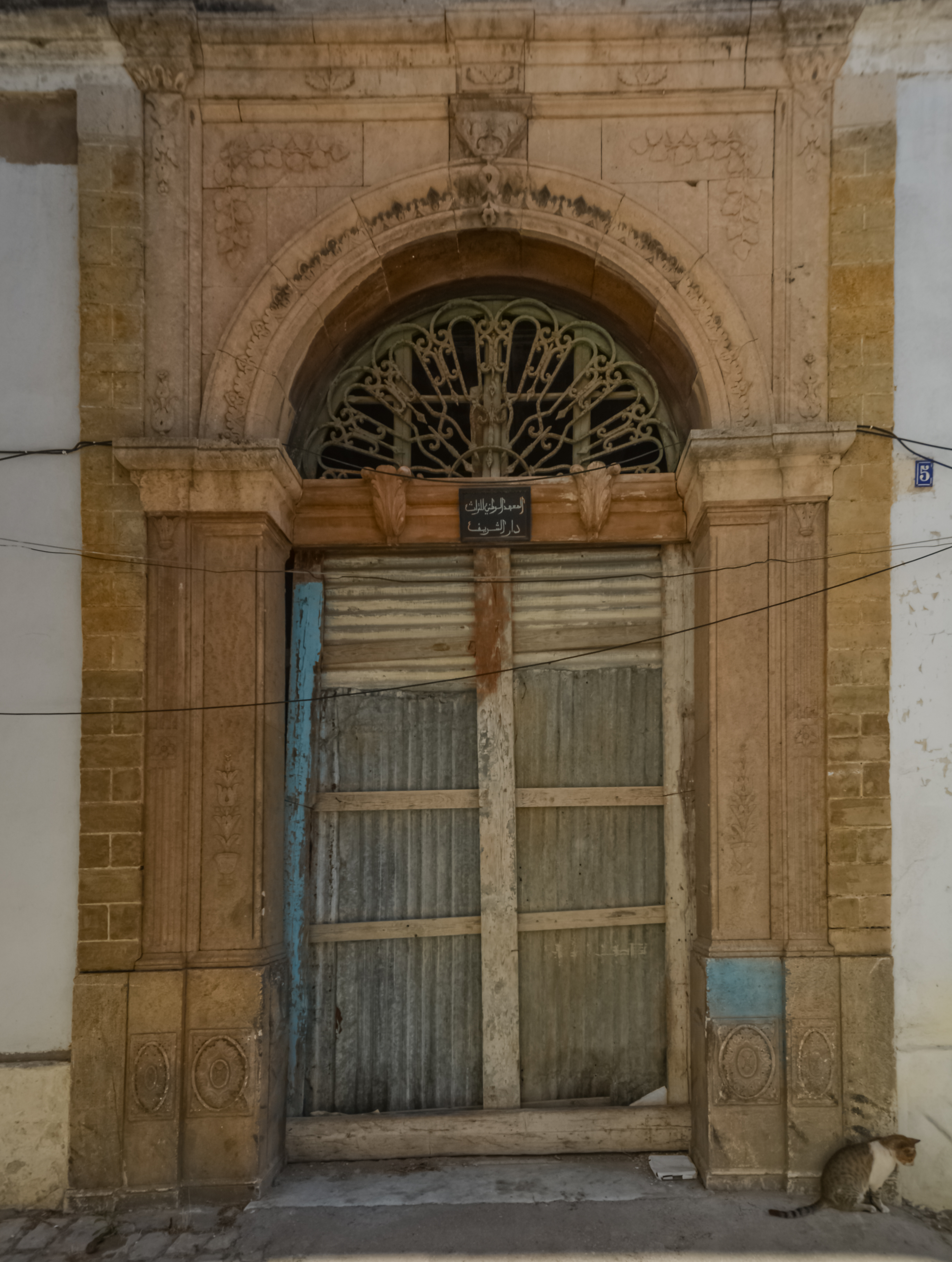 Dar Echérif